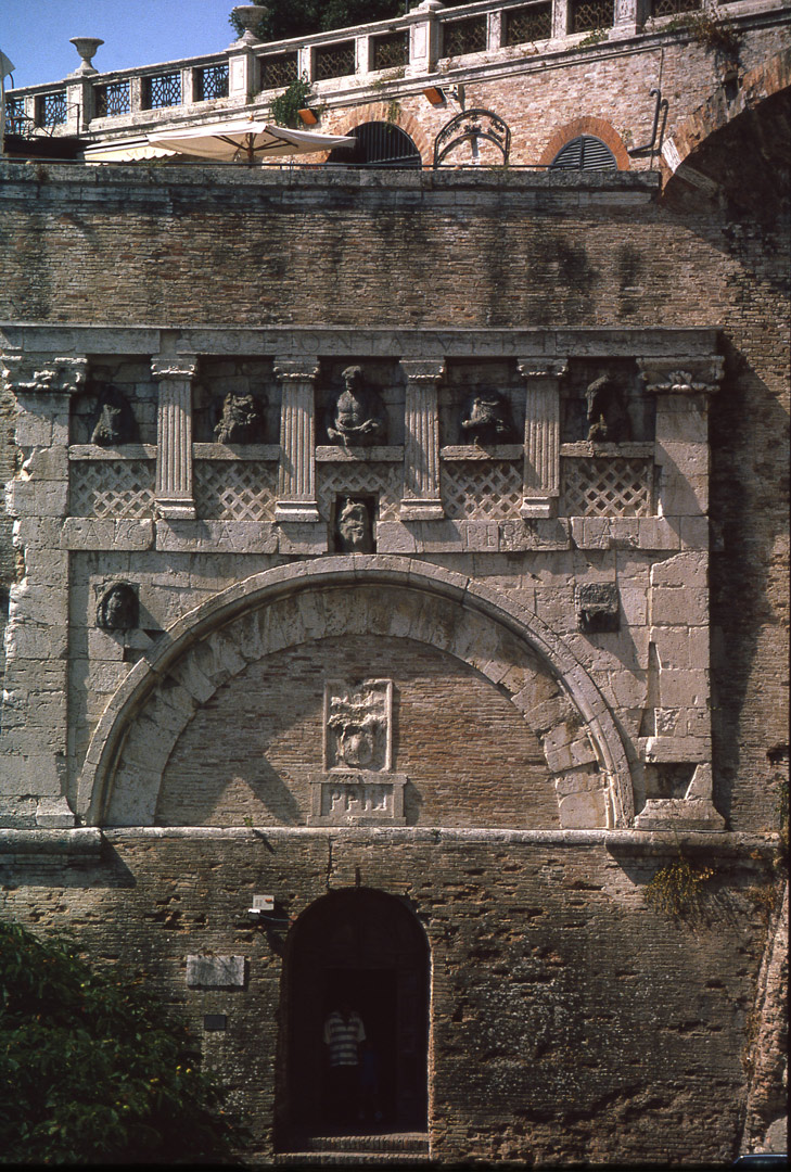 Porta Marzia This is a photo of a monument which is part of cultural heritage of Italy.